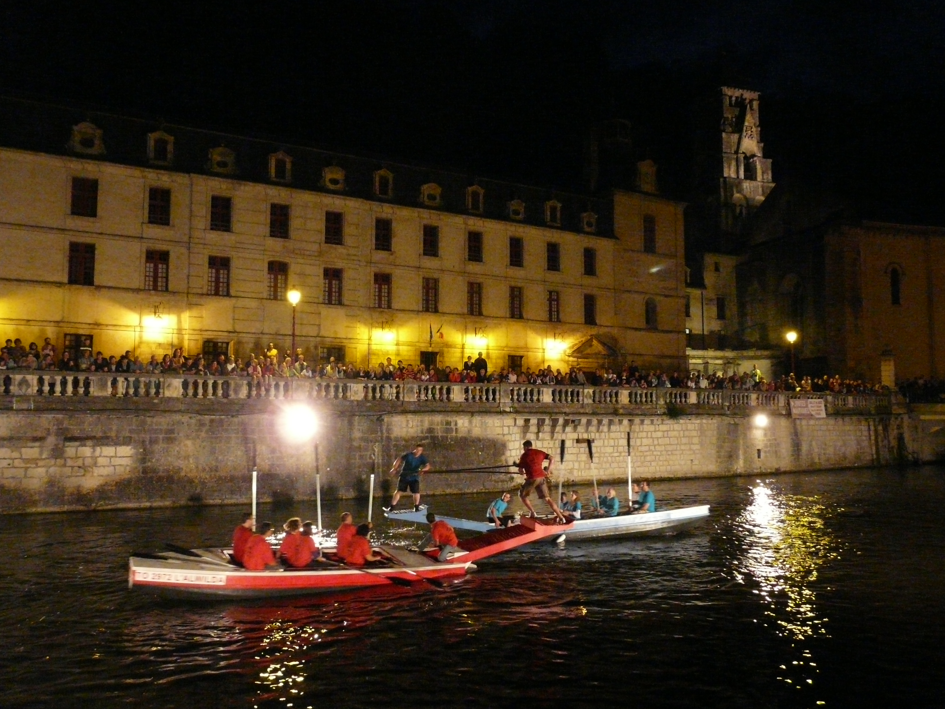 Joute nautique nocturne sur la Dronne devant l'abbaye de Brantôme, Dordogne, France.